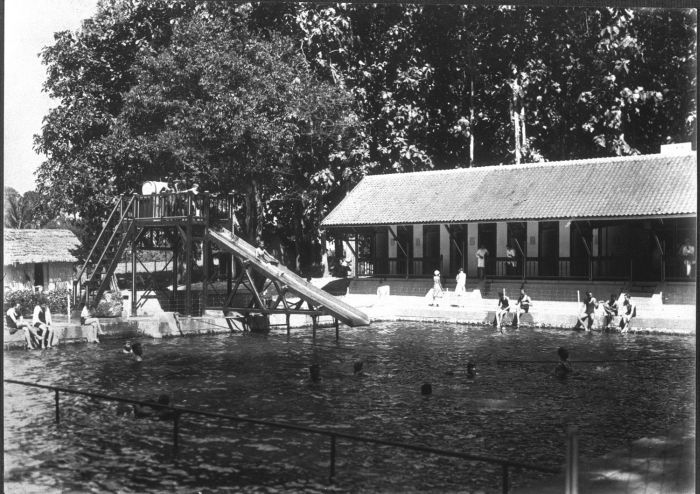 Foto. De glijbaan en badkamers bij het zwembad van Tasman in de omgeving van Bondowoso op Oost-Java